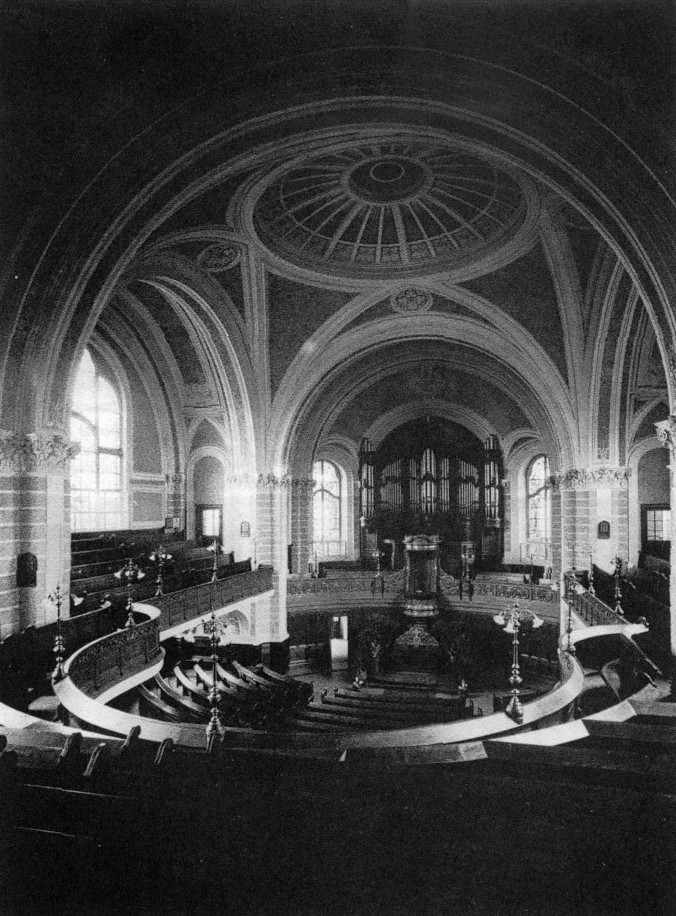 Das Innere der Wuppertaler Christusskriche im Zustand nach der Erbauung 1901